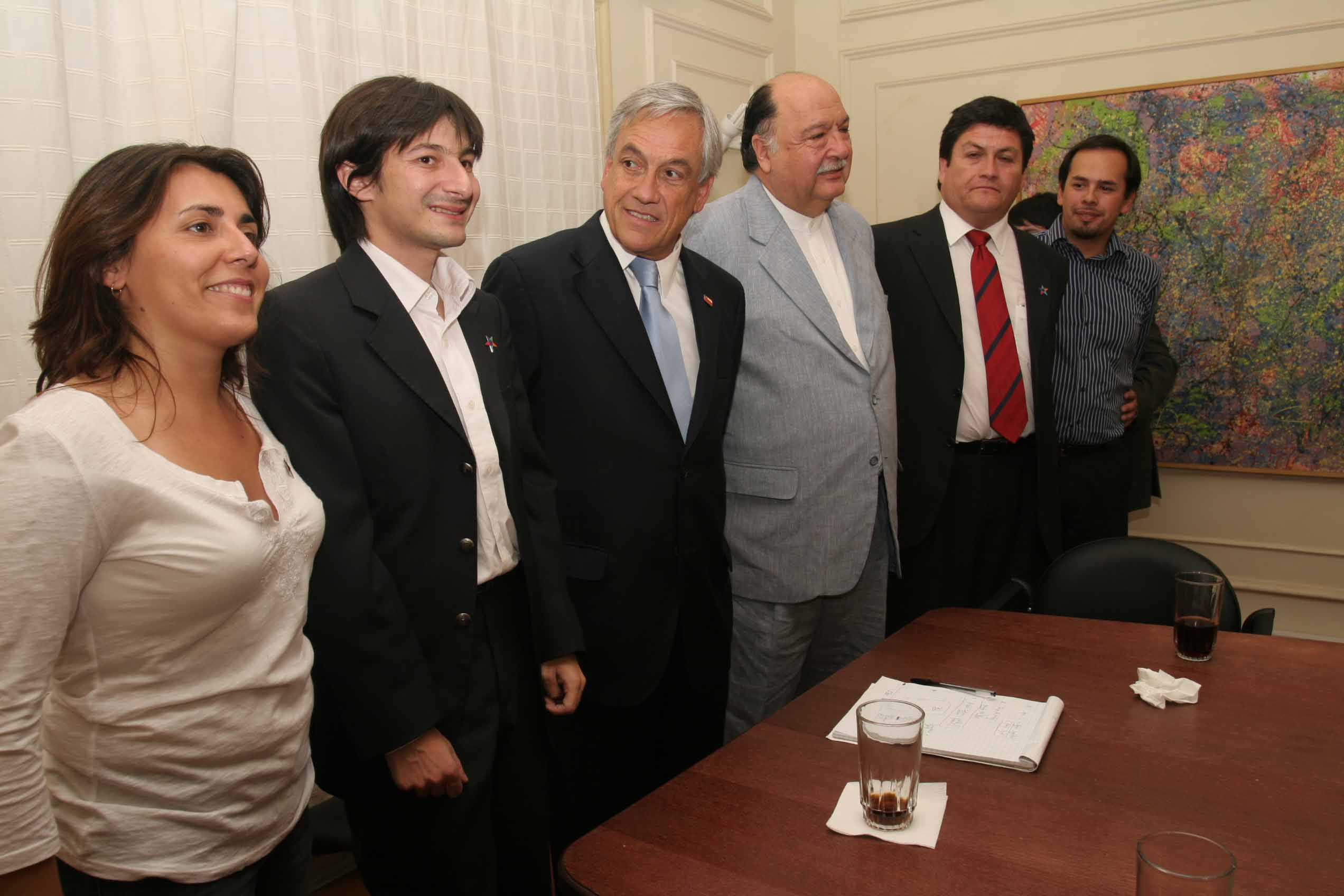 Directiva de Chile Primero junto a Sebastián Piñera.